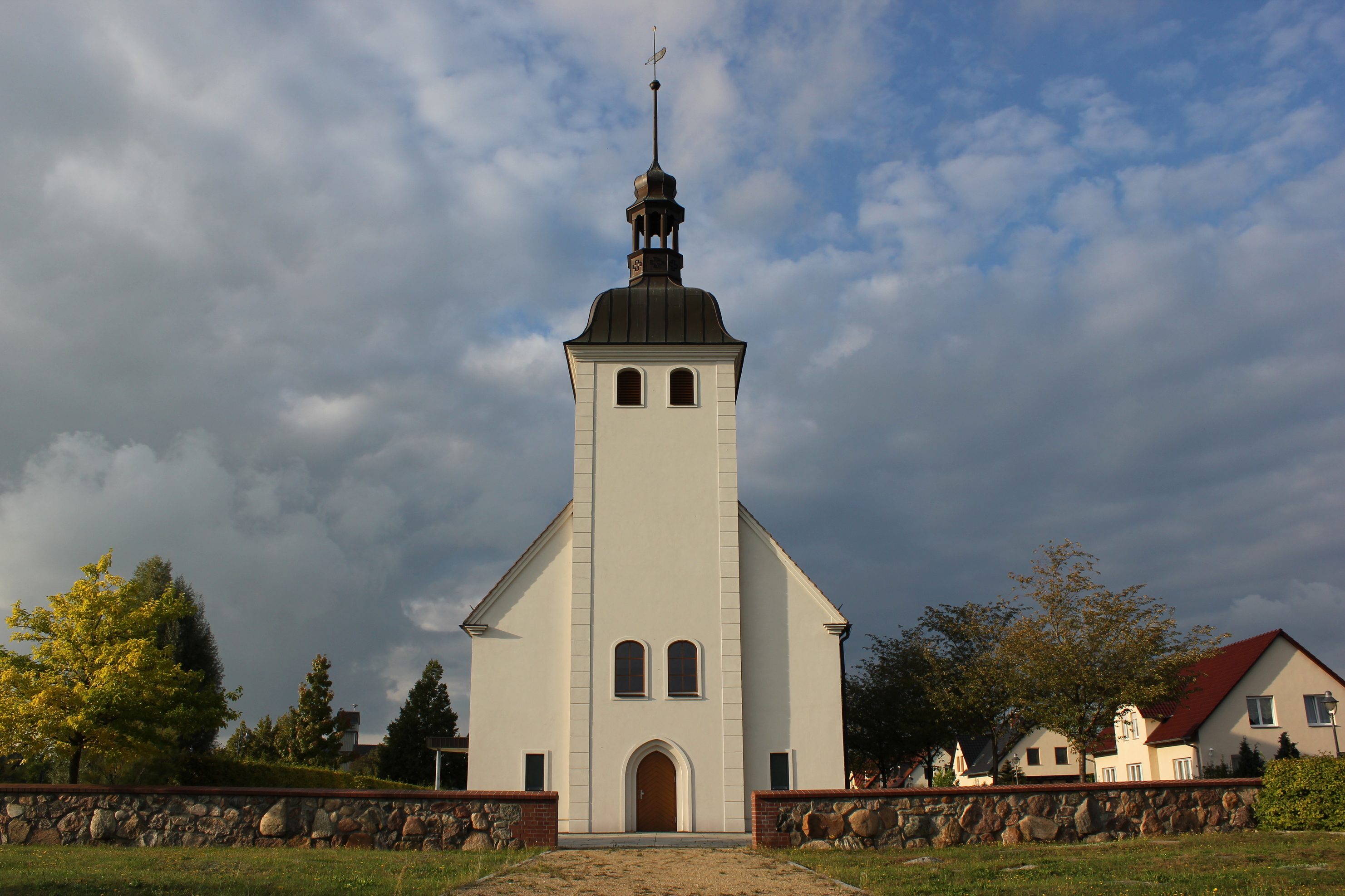 Hornjoserbsce: Noworogowska cyrkej.